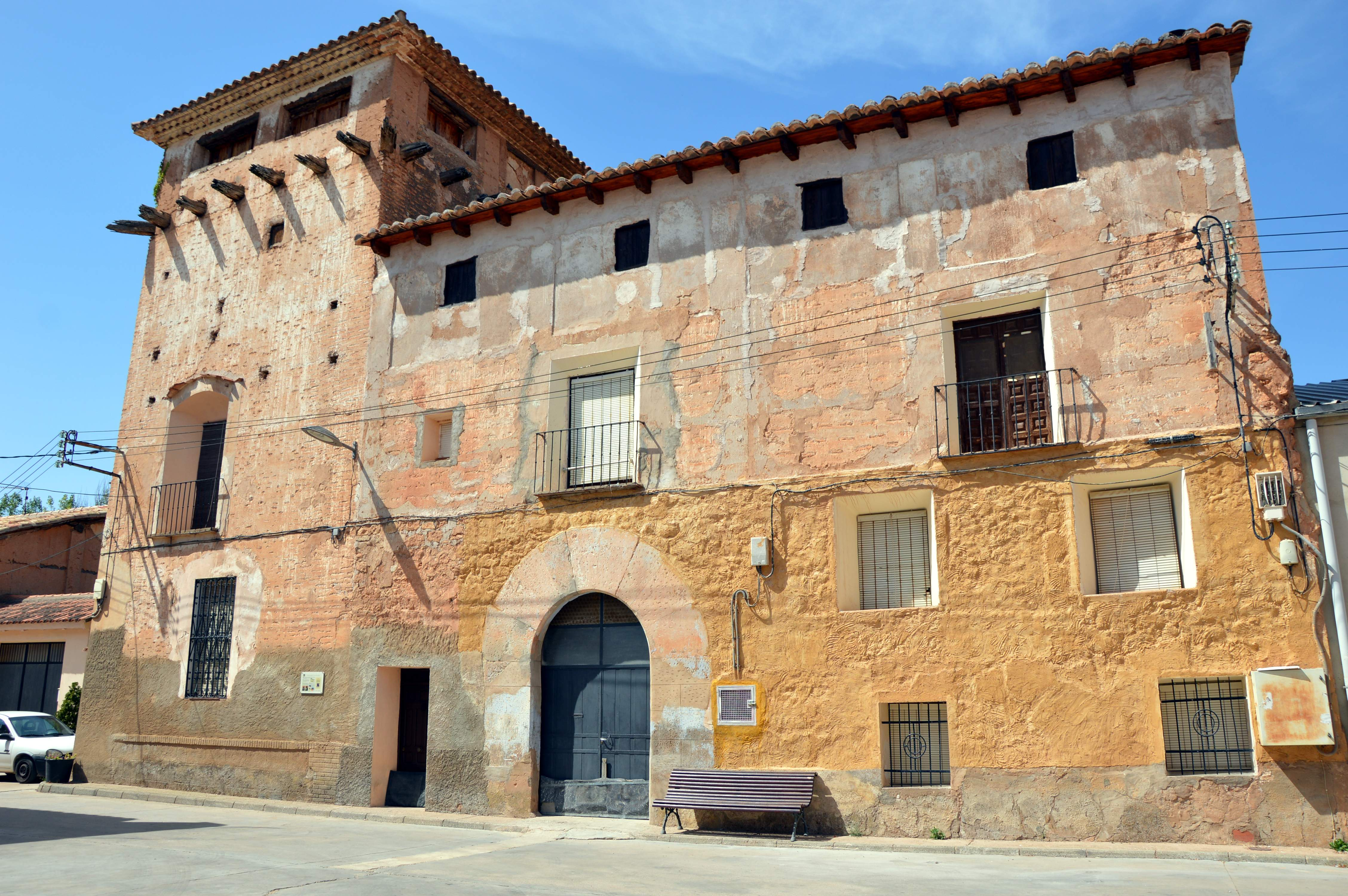 Vista frontal de la Casa Grande y Torreón de los Garcés de Marcilla en Torrealta, Torrebaja (Valencia).